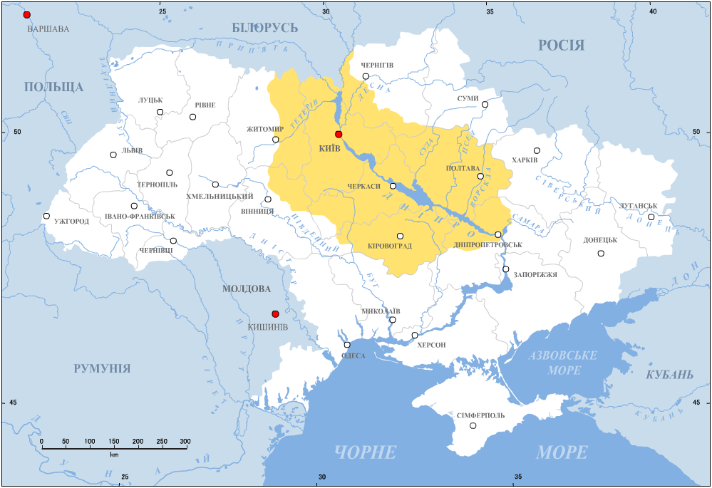 Надніпрянщина